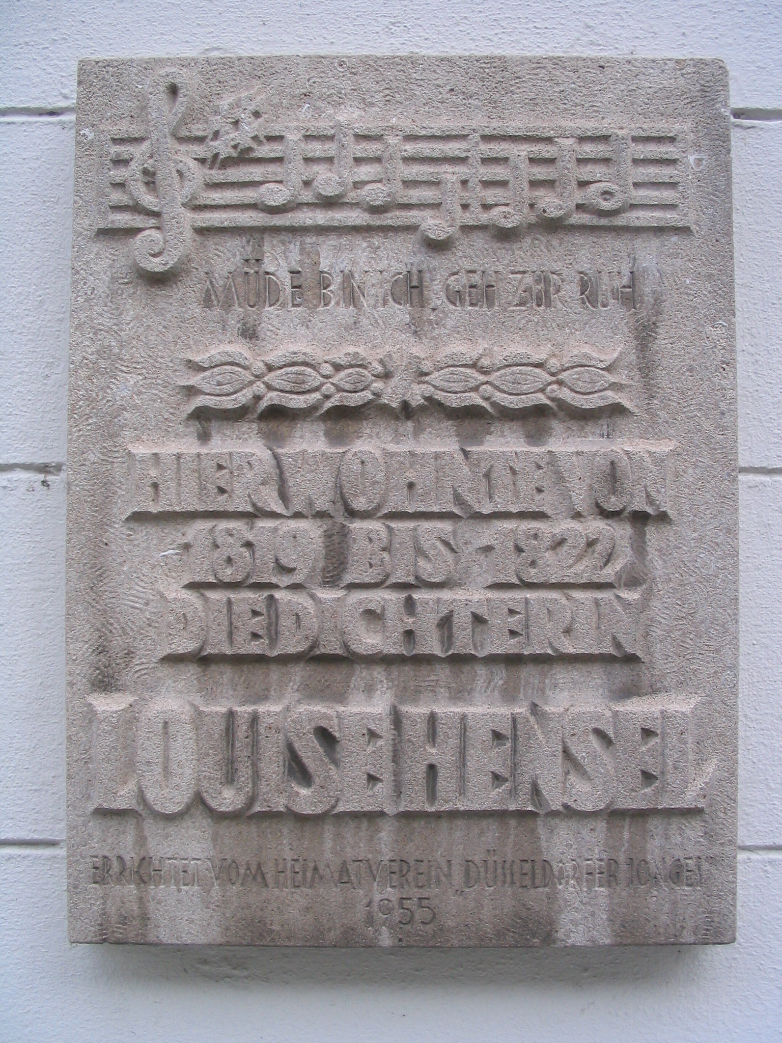 Müde bin ich geh zur Ruh Hier wohnte von 1819 bis 1822 die Dicherin Louise Hensel Errichtet vom Heimatverein Düsseldorfer Jonges 1955 Düsseldorf, am Haus Bilker Straße 14. Denkmalgeschütztes Bauwerk. Eine vom Düsseldorfer Hochbauamt entworfene Gedenktafel.